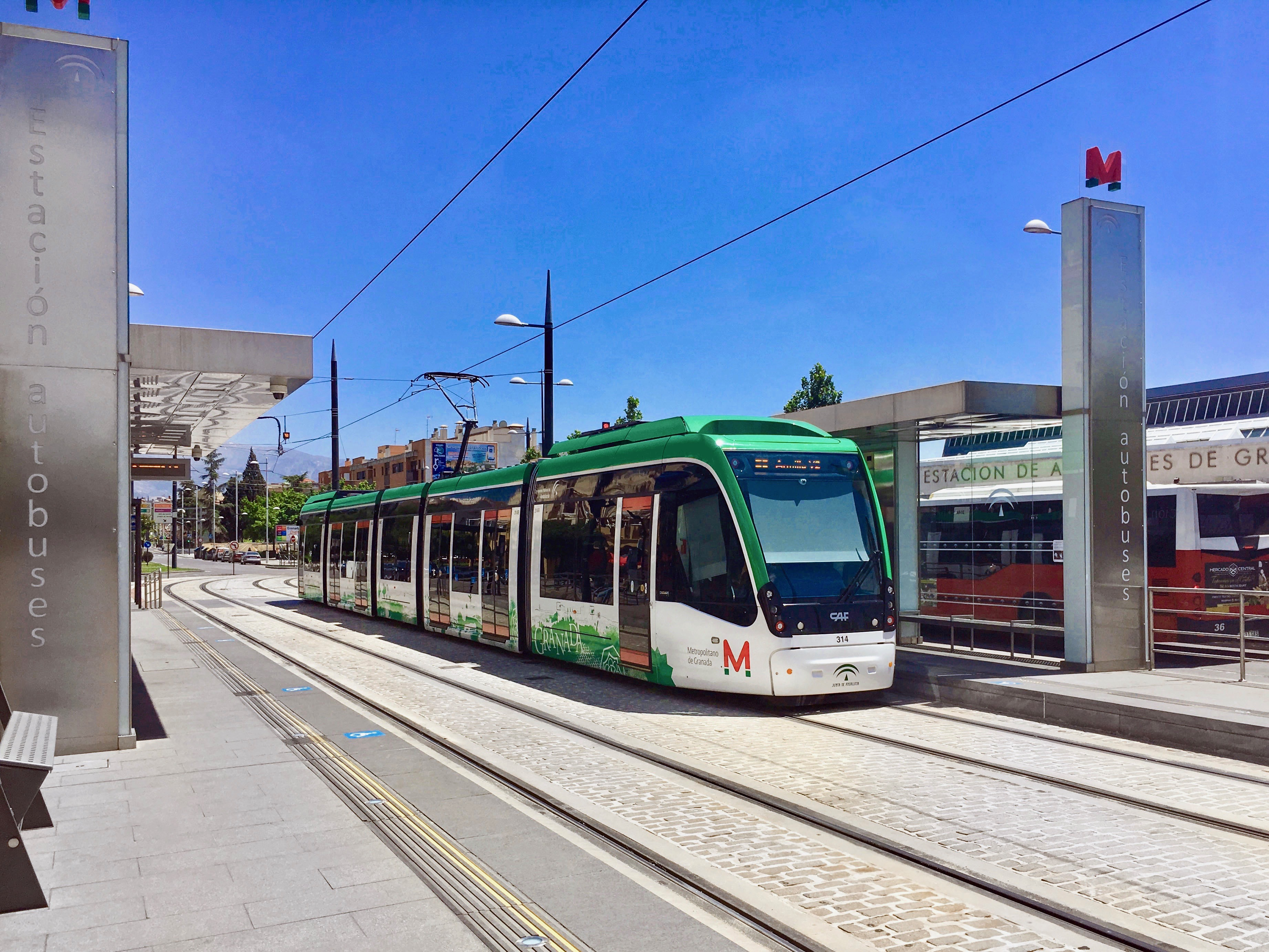 Parada del Metro de Granada denominada «Estación Autobuses» debido a su proximidad con la terminal de buses situada frente a ella.